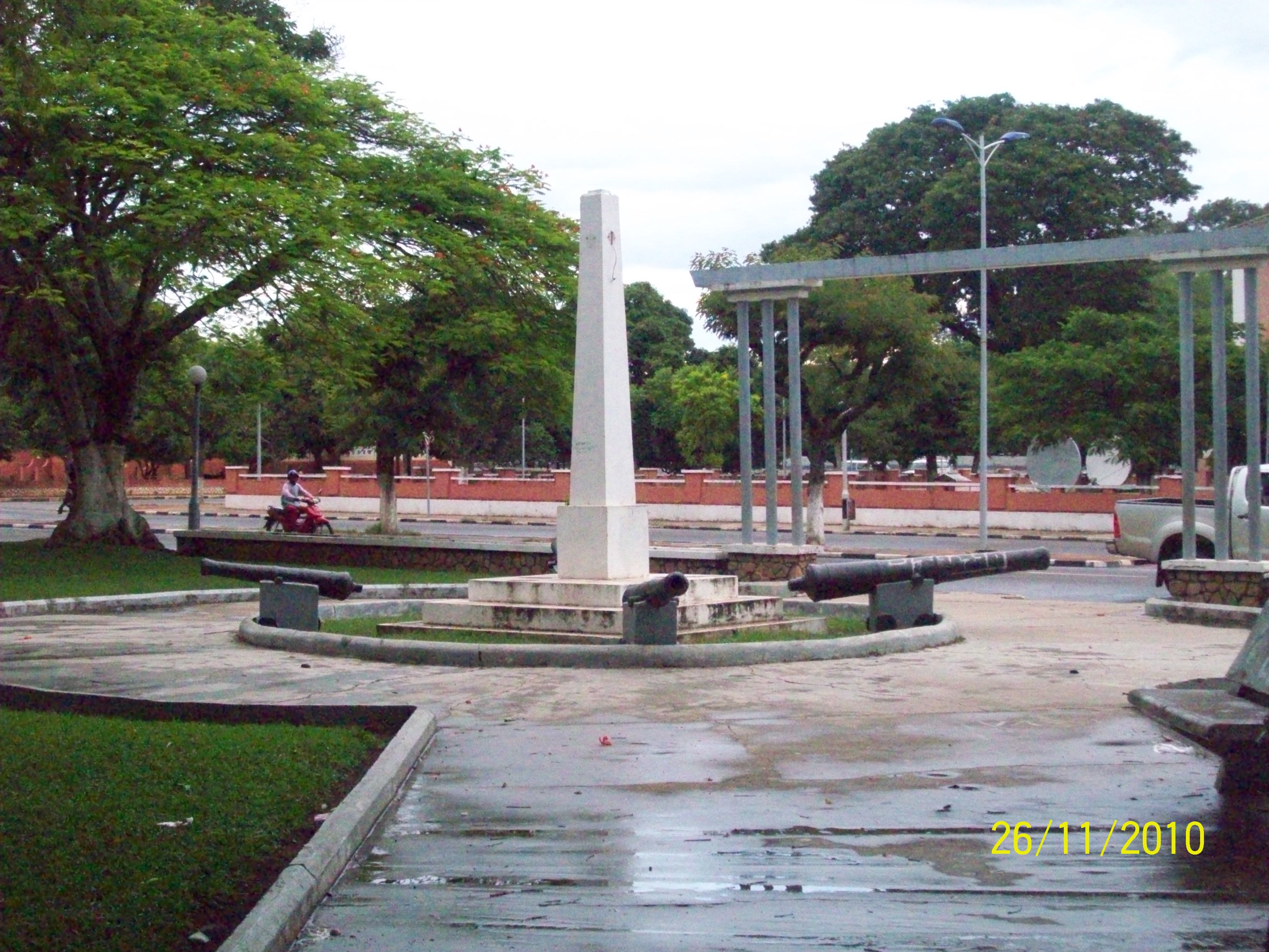 esta é uma foto do jardim do palácio do governador que tem uma bela vista bastante agradável.